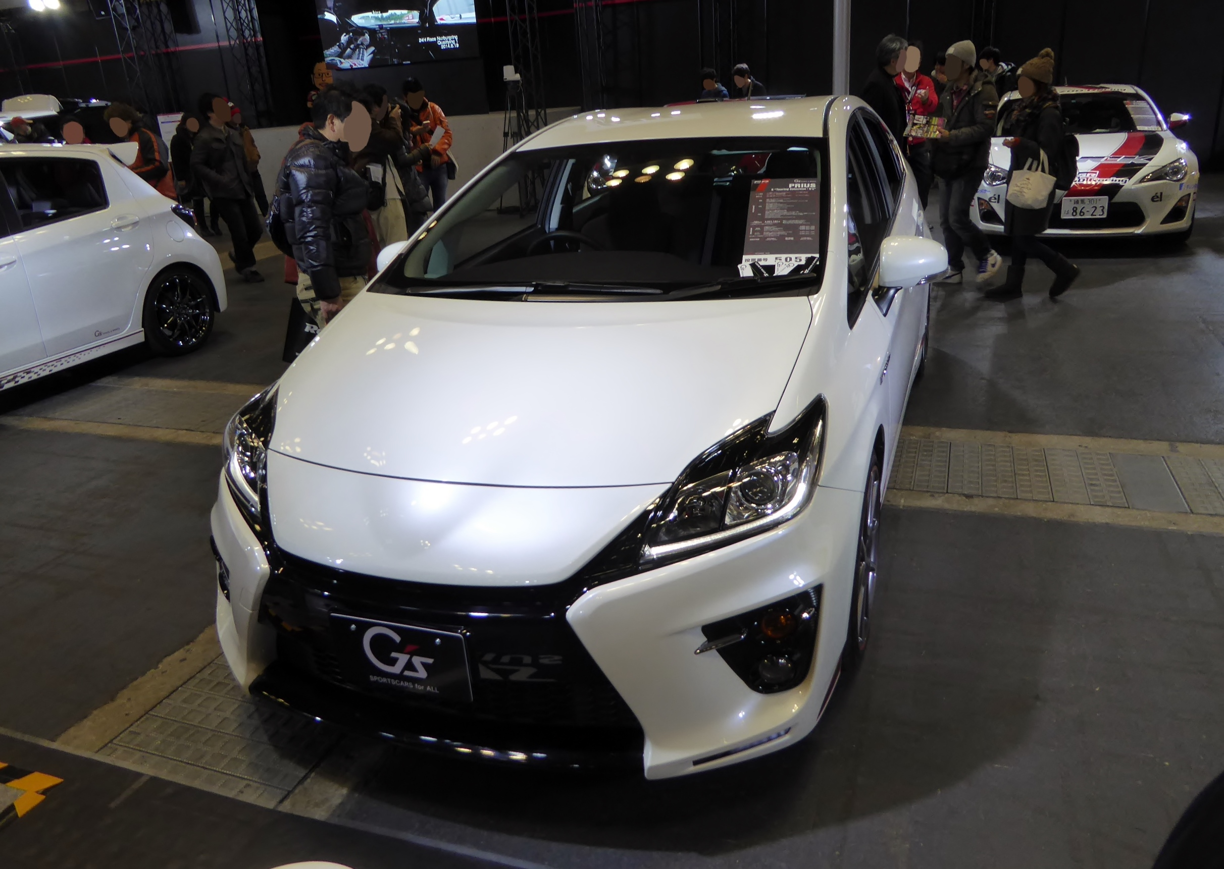 大阪オートメッセ2015においてZVW30型トヨタ・プリウス S"ツーリングセレクション・G's"を撮影。